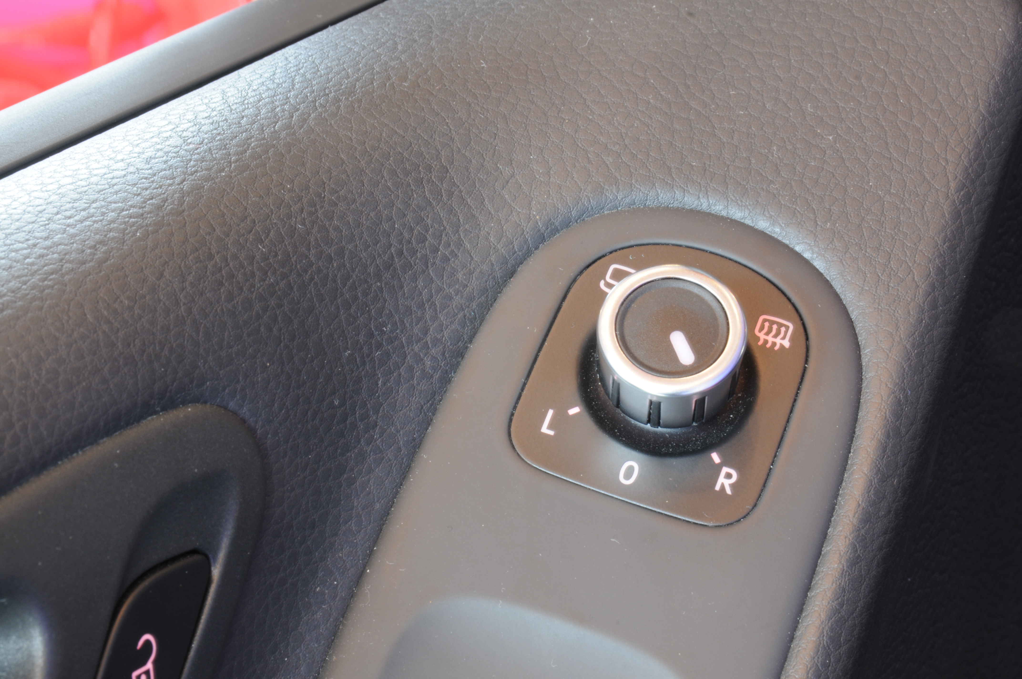 Detail Volkswagen